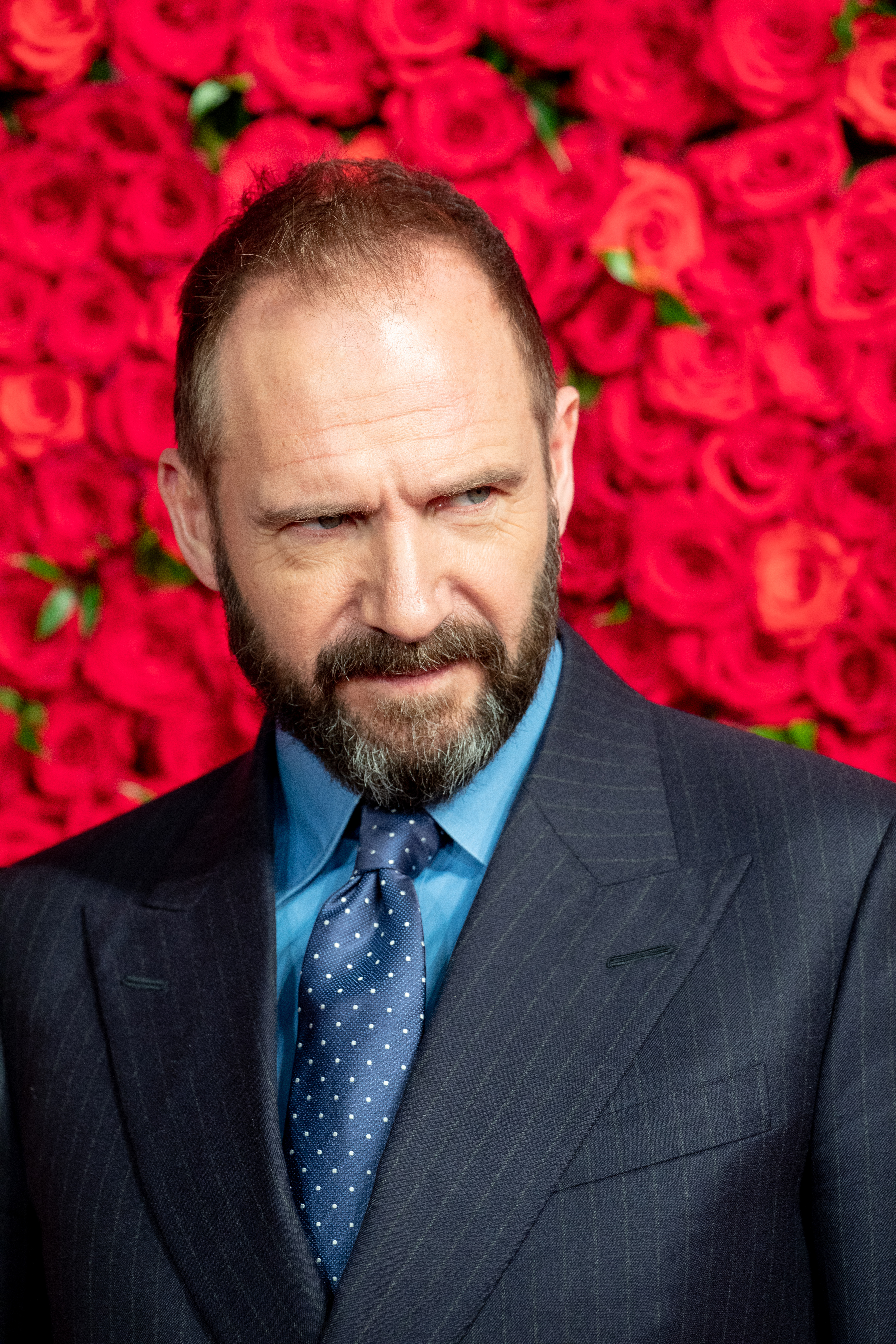 第30回 東京国際映画祭 オープニングセレモニー レイフ・ファインズ (ホワイト・クロウ)